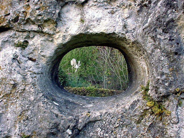 Heidenstein - Niederschwörstadt - Baden-Württemberg - Deutschland